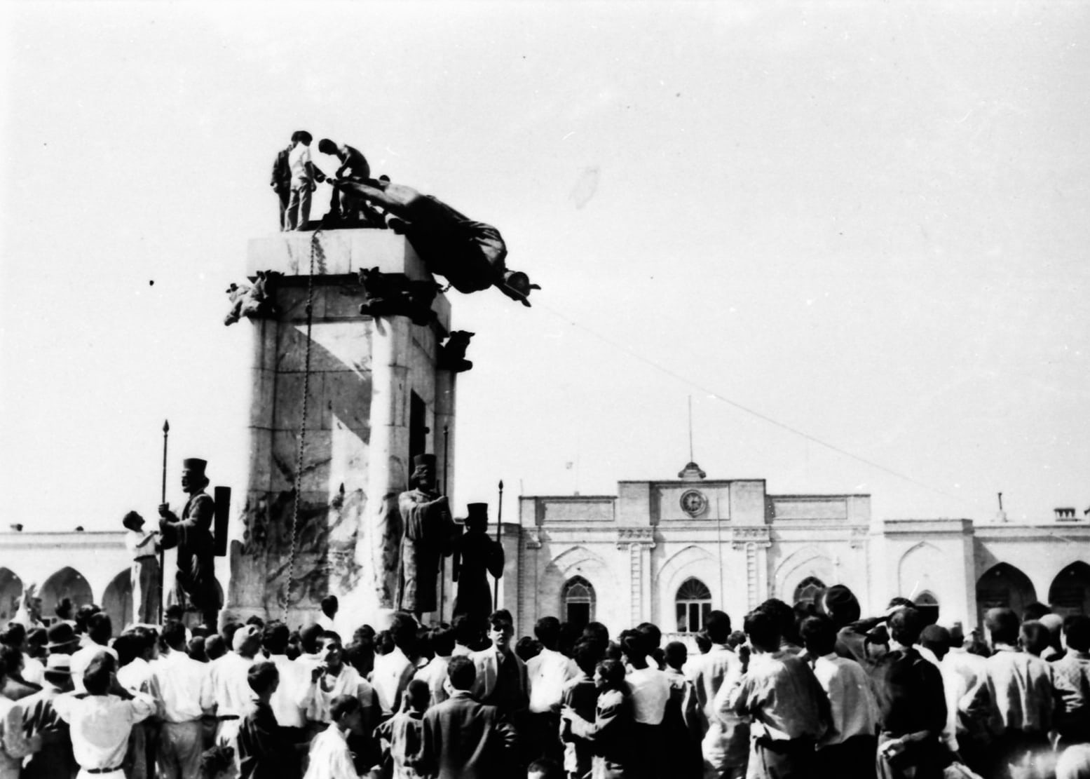 27 مرداد 1332: بدون جلوگیری پلیس یا سربازان، جمعیت، مجسمه رضا شاه در میدان سپه (توپخانه کنونی) را به زیر می کشند.